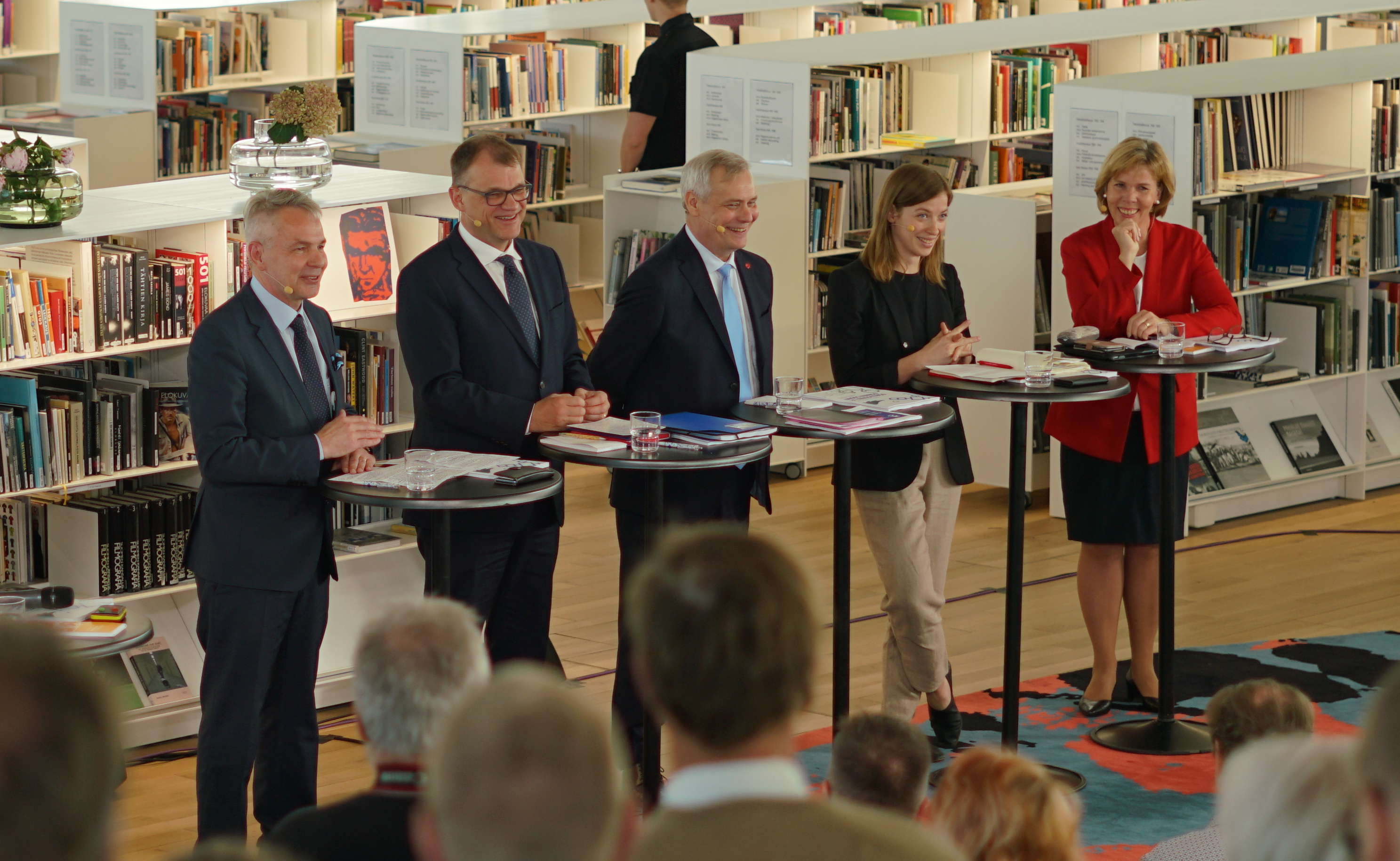 Rinteen hallituksen hallitusohjelman julkistus Oodissa 2019-06-03